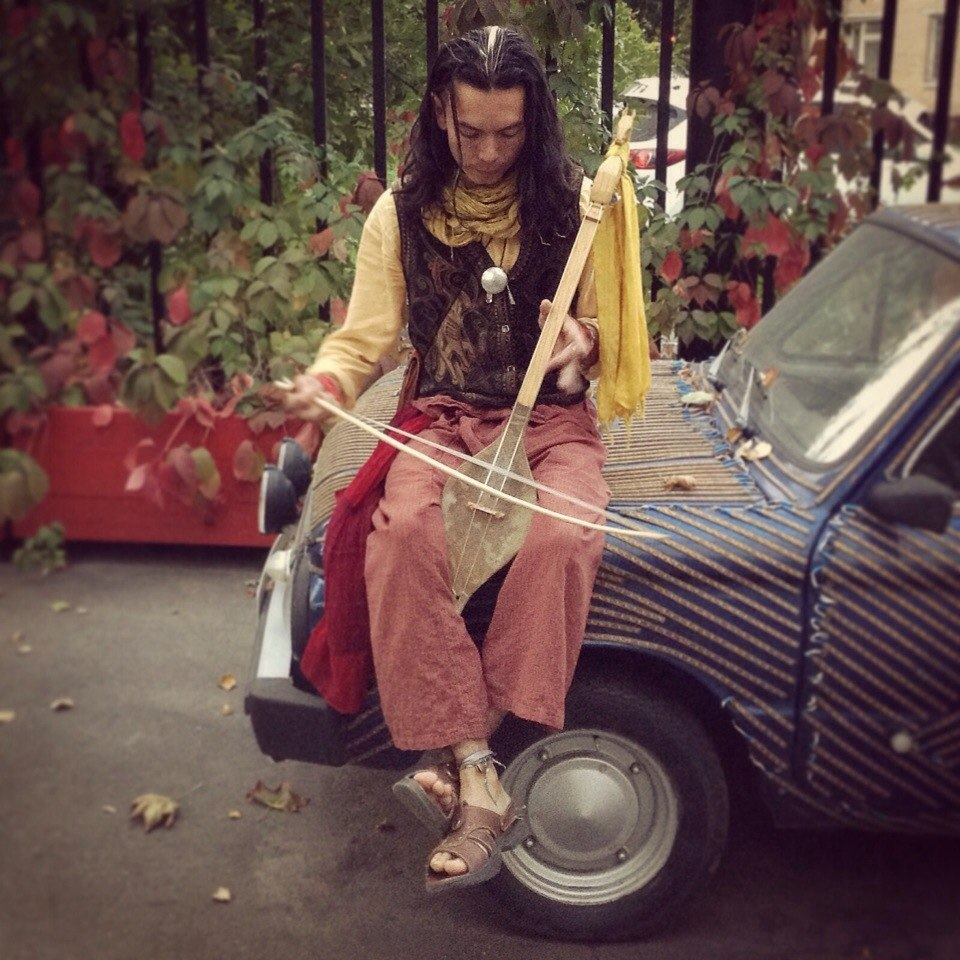 Тыва дыл: Икаро, 2014